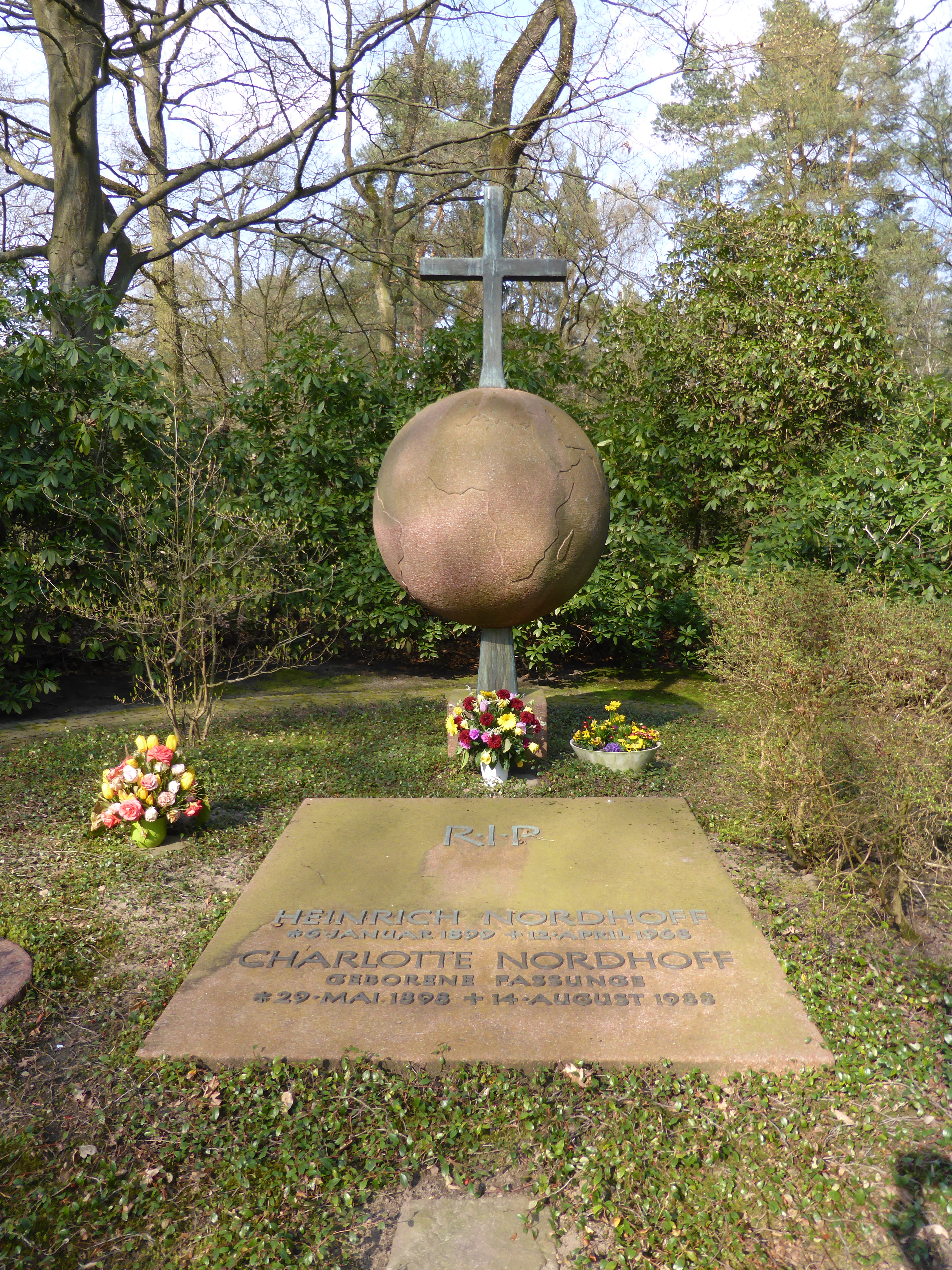 Grabstätte von Heinrich Nordhoff auf dem Waldfriedhof in Wolfsburg.